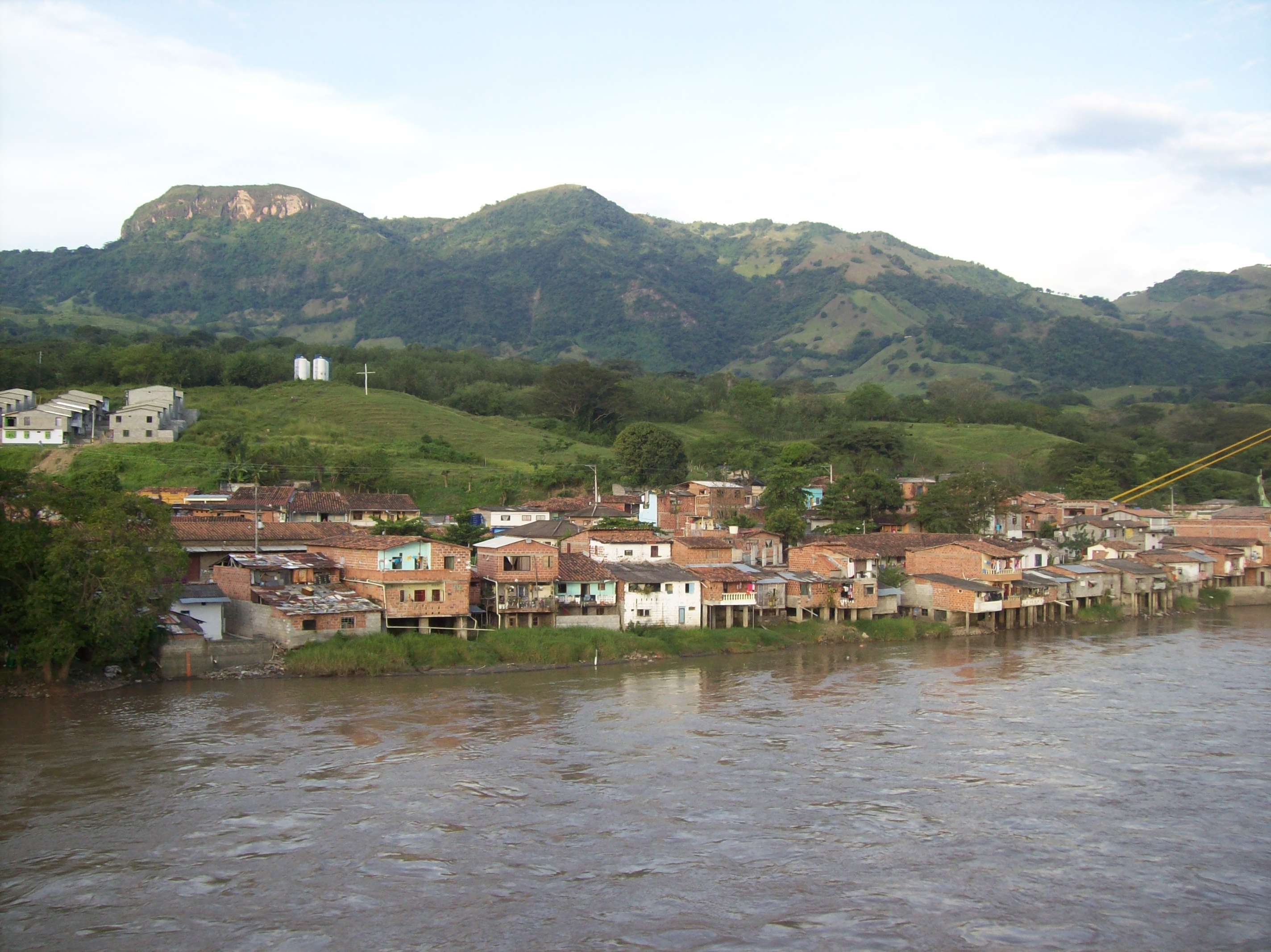 Puente sobre el Río Cauca en La Pintada, Antioquia.